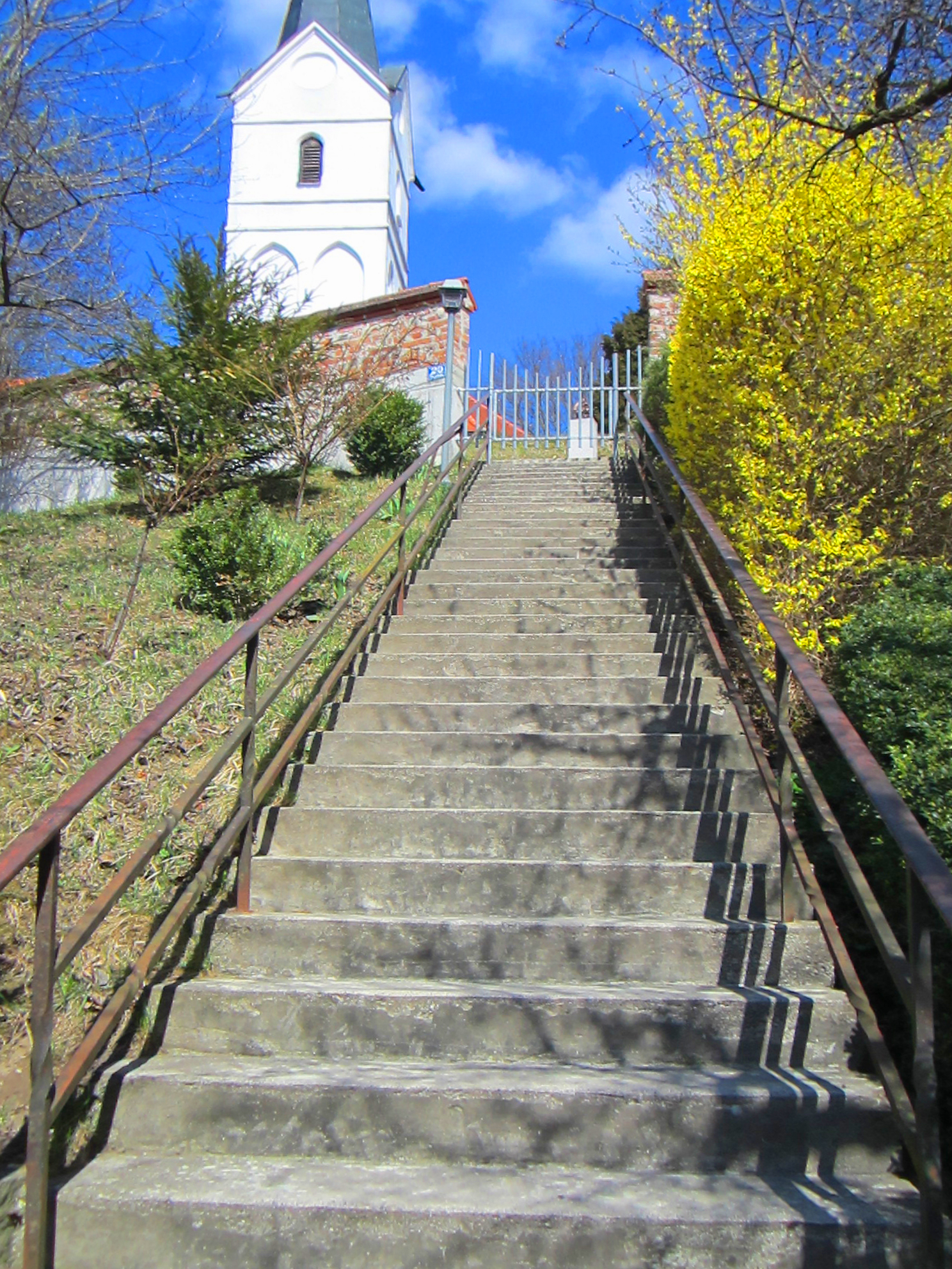 Die Treppe zur Kirche St. Paul in Bruckberg.